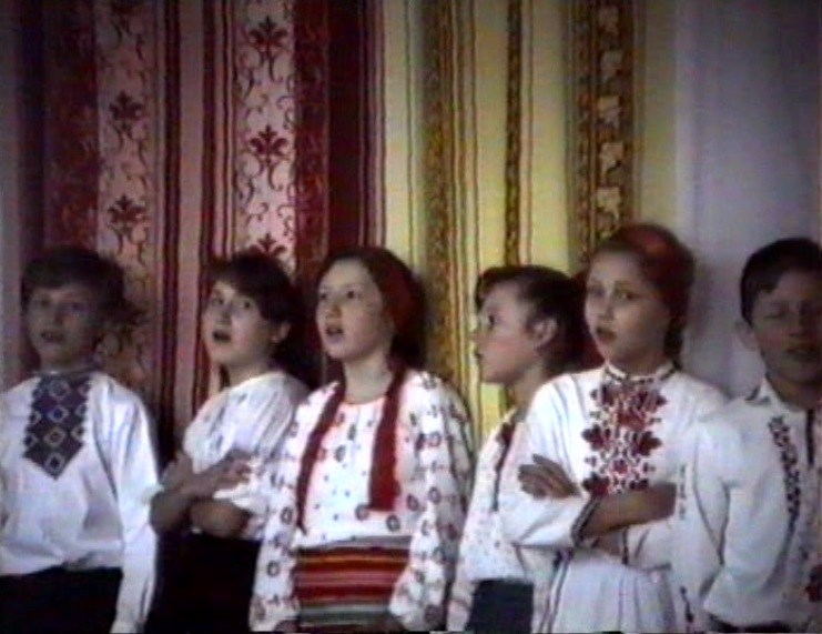 Зустріч ветеранів у селі Мар'ївка Баштанського району 1994 р.